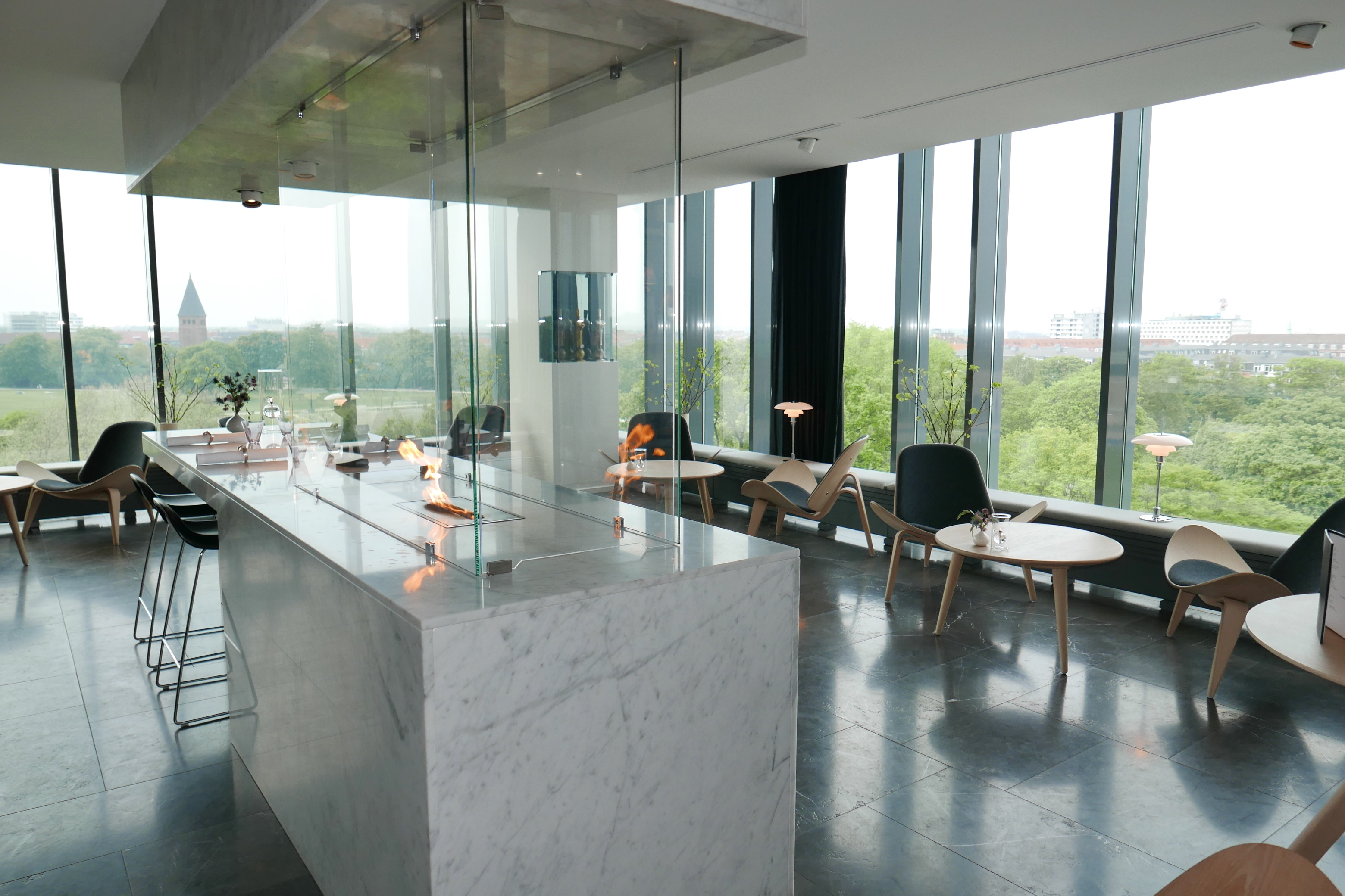 Geranium